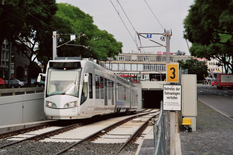 Ostrampe des Regiotram-Tunnels am Kasseler Hauptbahnhof